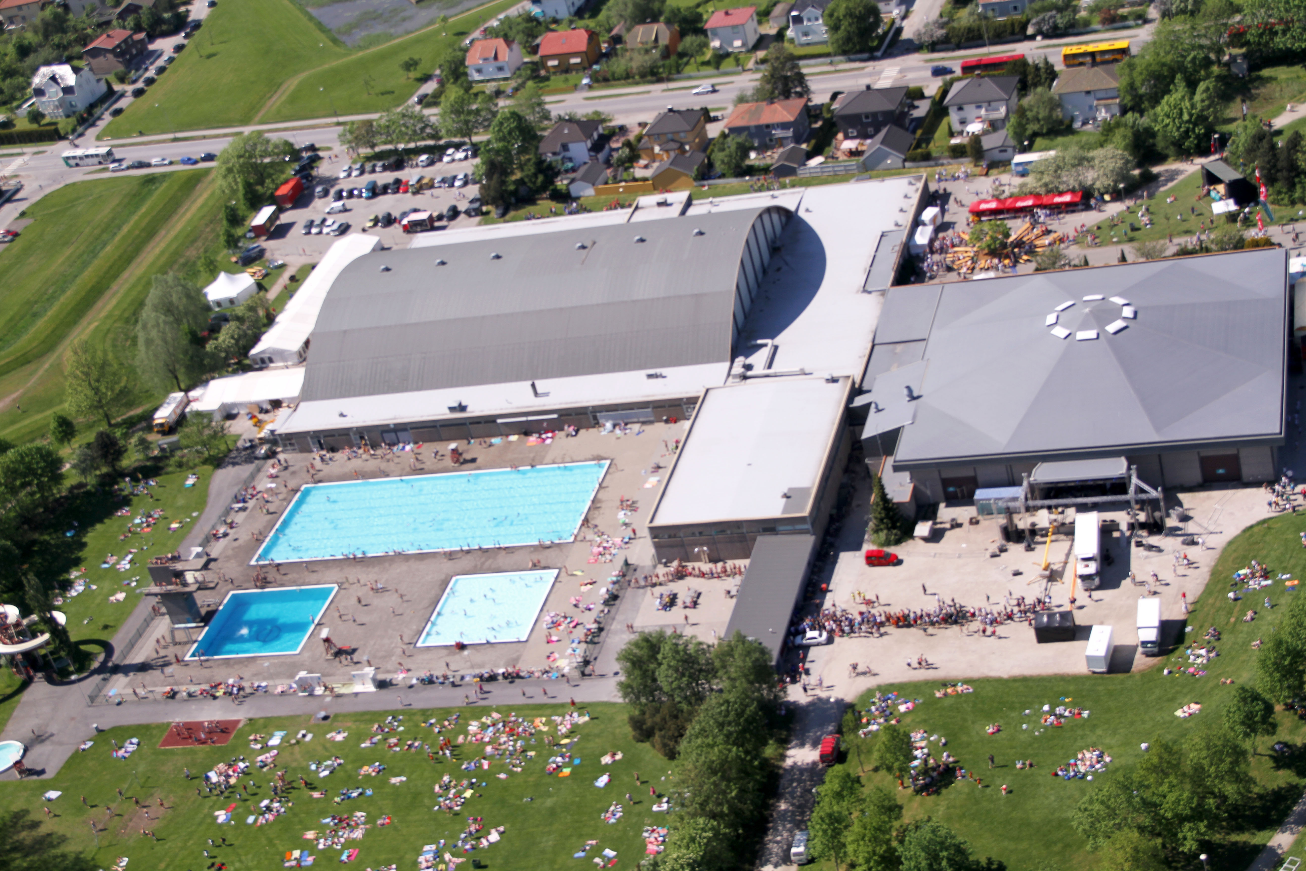 Kongsten